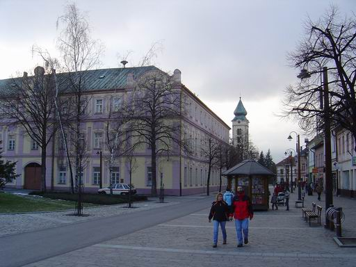 Námestie osloboditeľov Obrázok odfotil Kristián Slimák. Kategória:Obrázky budov Kategória:Presunúť na Commons